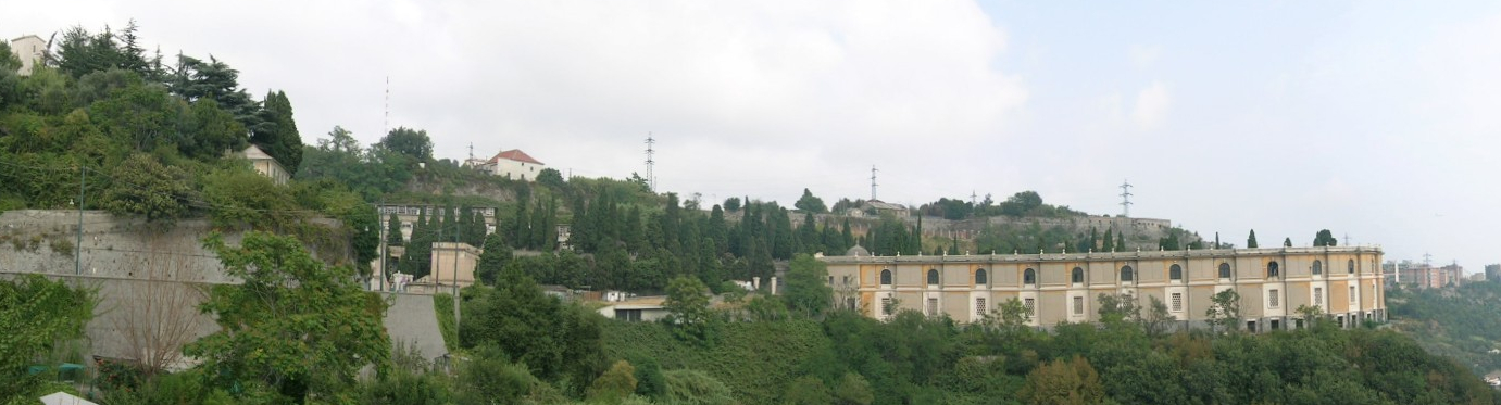 autore f.noceti